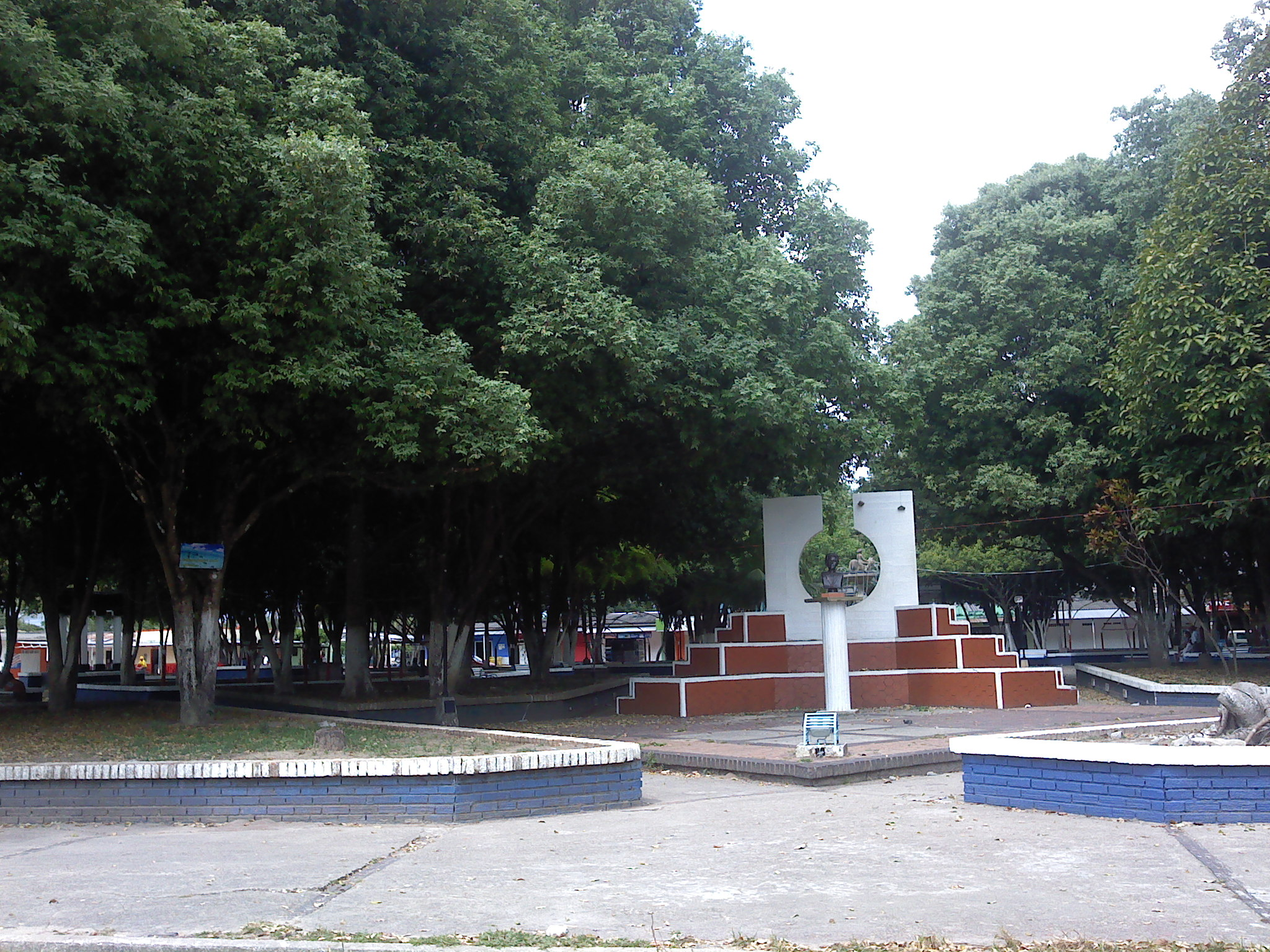 Parque del municipio de Fortul (Arauca)